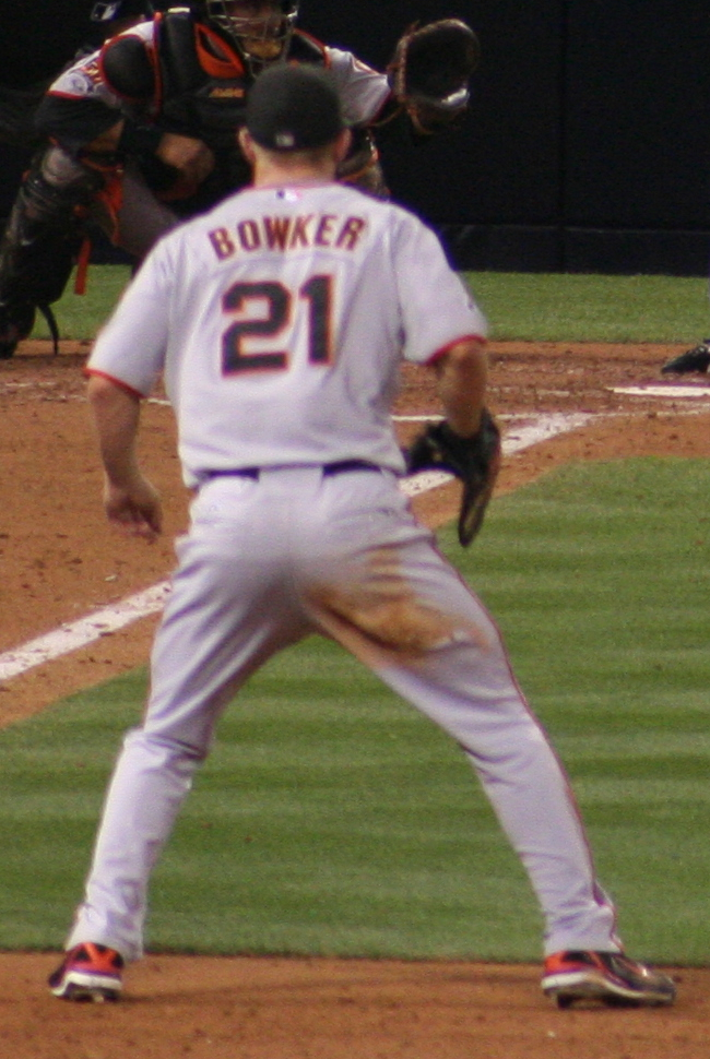 John Bowker